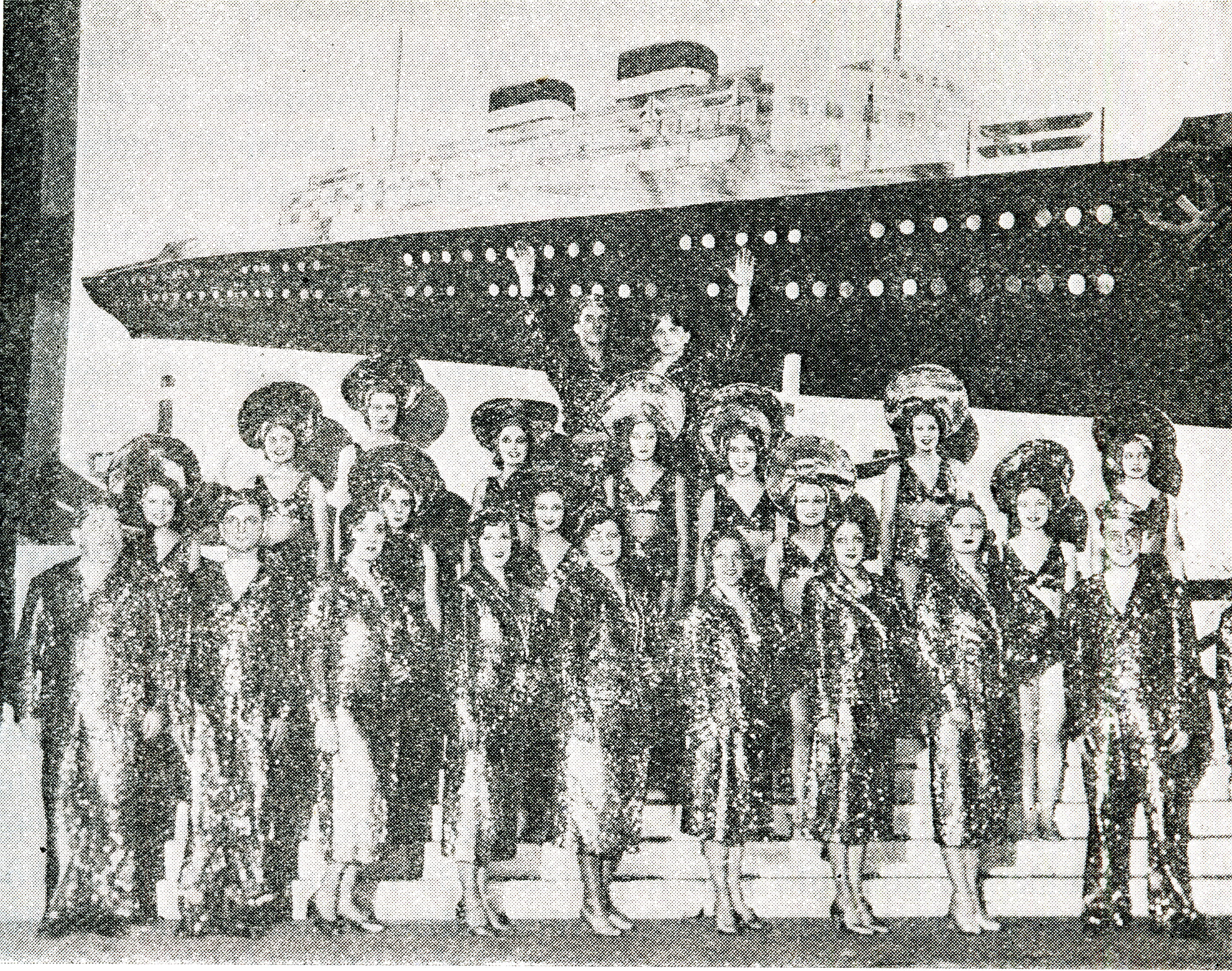 Finałowa scena z rewii Złota defilada w teatrze "Morskie Oko"